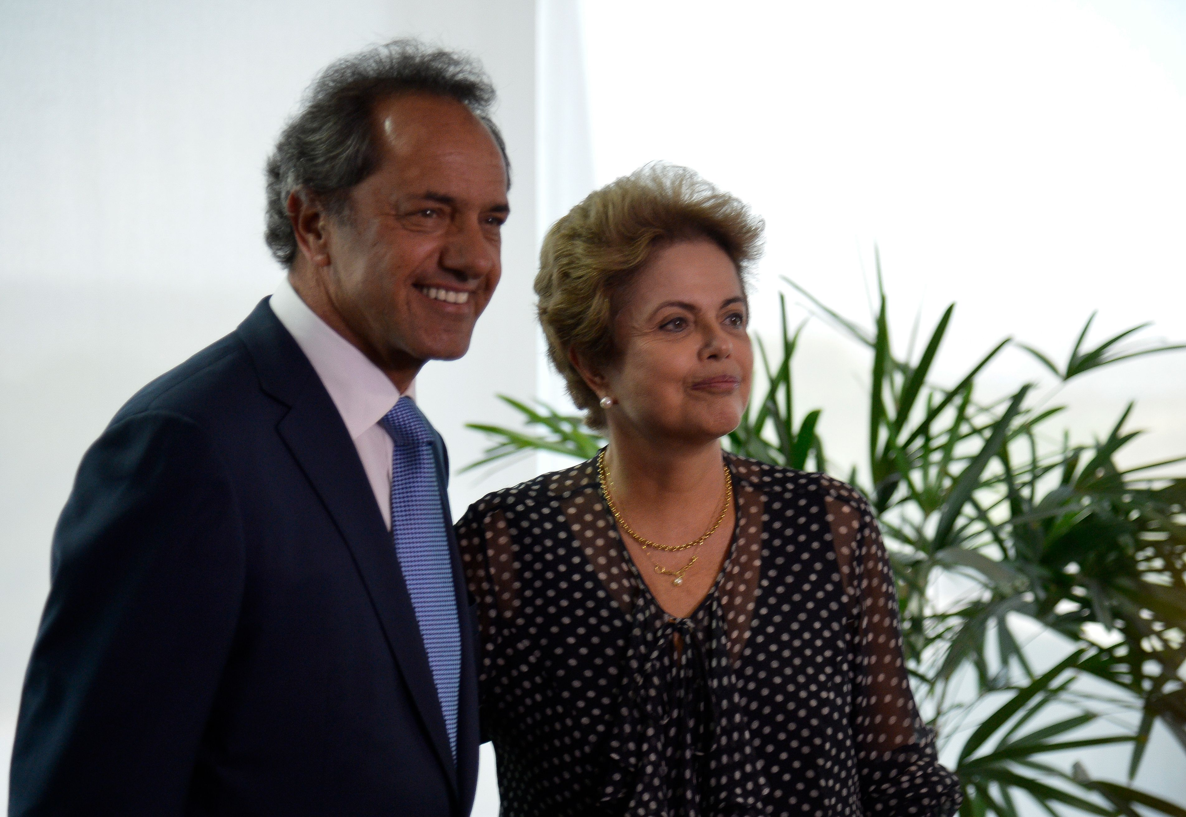 Brasília - A presidenta Dilma Rousseff, recebe o governador da província de Buenos Aires, Daniel Scioli.